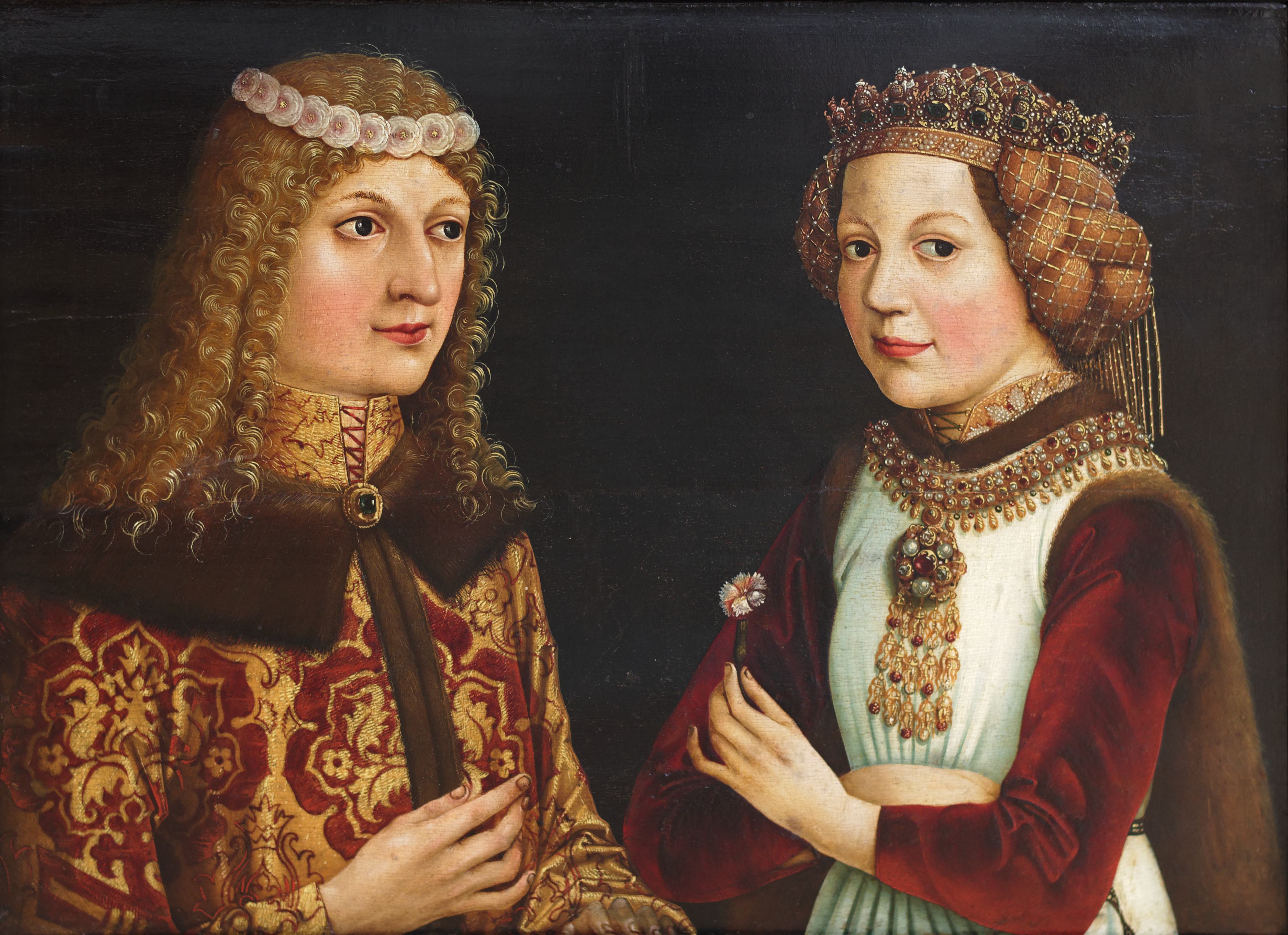 Portrait de fiançailles de Ladislas Ier de Bohême et de Madeleine de France (1443-1495). Peintre autrichien, seconde moitié du XVe siècle. Exposé au Musée des beaux arts de Budapest Inv.Nr 6960., prêt du Musée National Hongrois